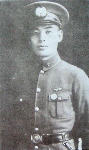 沈崇誨